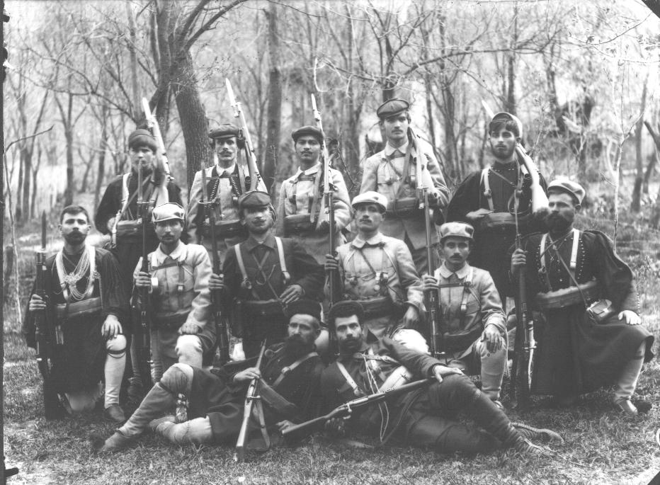 Cheta of IMARO voivoida Aleksander Koshka, 1907